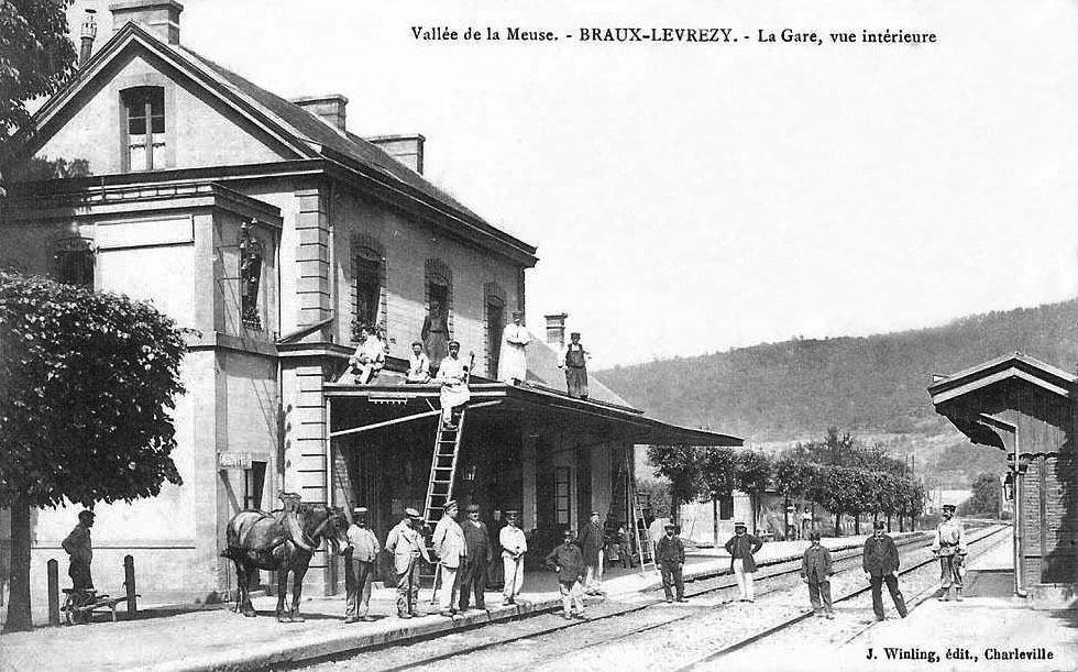 L'intérieur de l'ancienne gare de Braux-Levrezy devenue Bogny-sur-Meuse.